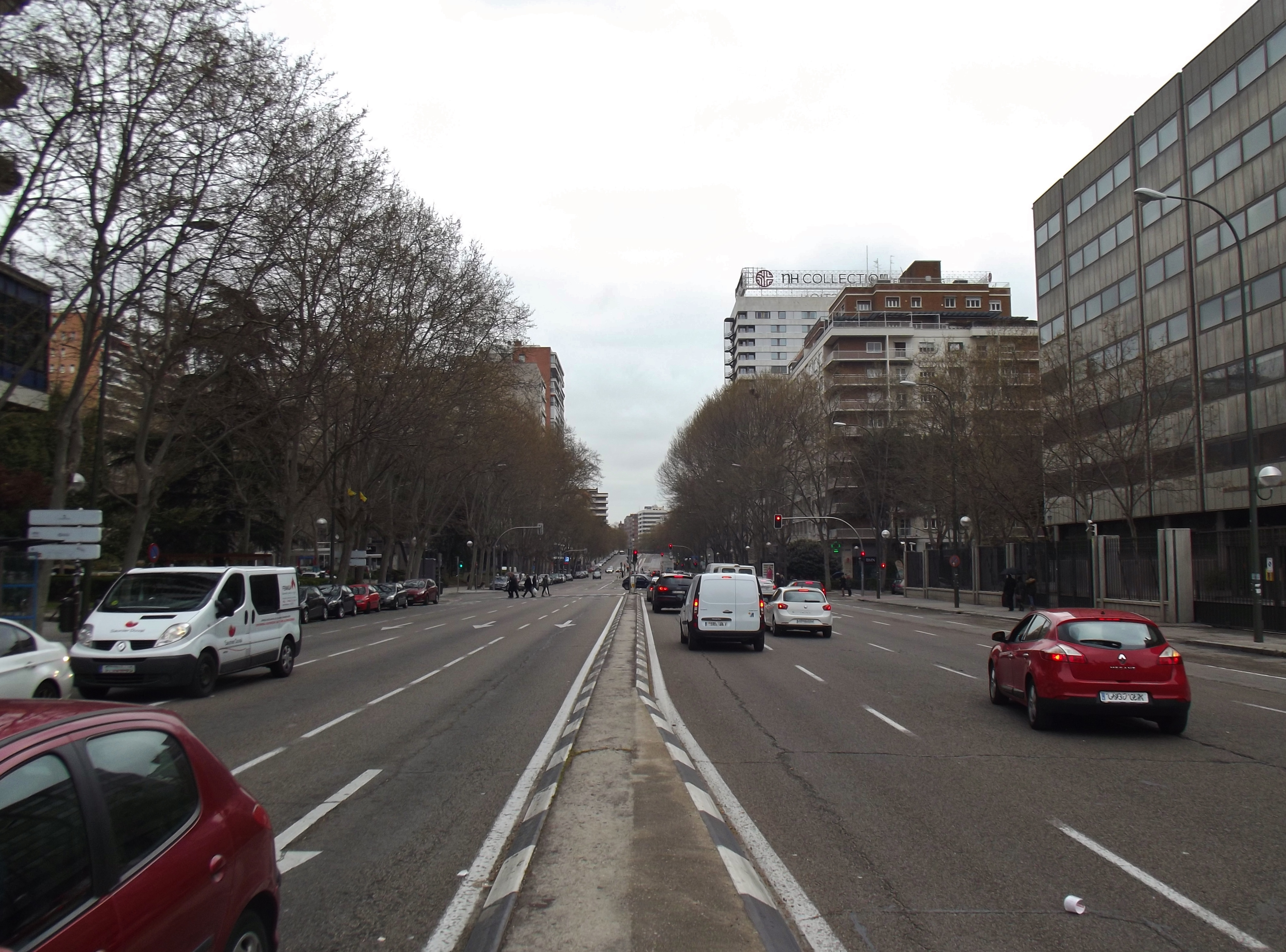 Avenida de Alberto Alcocer, Madrid. This is a retouched picture, which means that it has been digitally altered from its original version. Modifications: Distorted car plates.